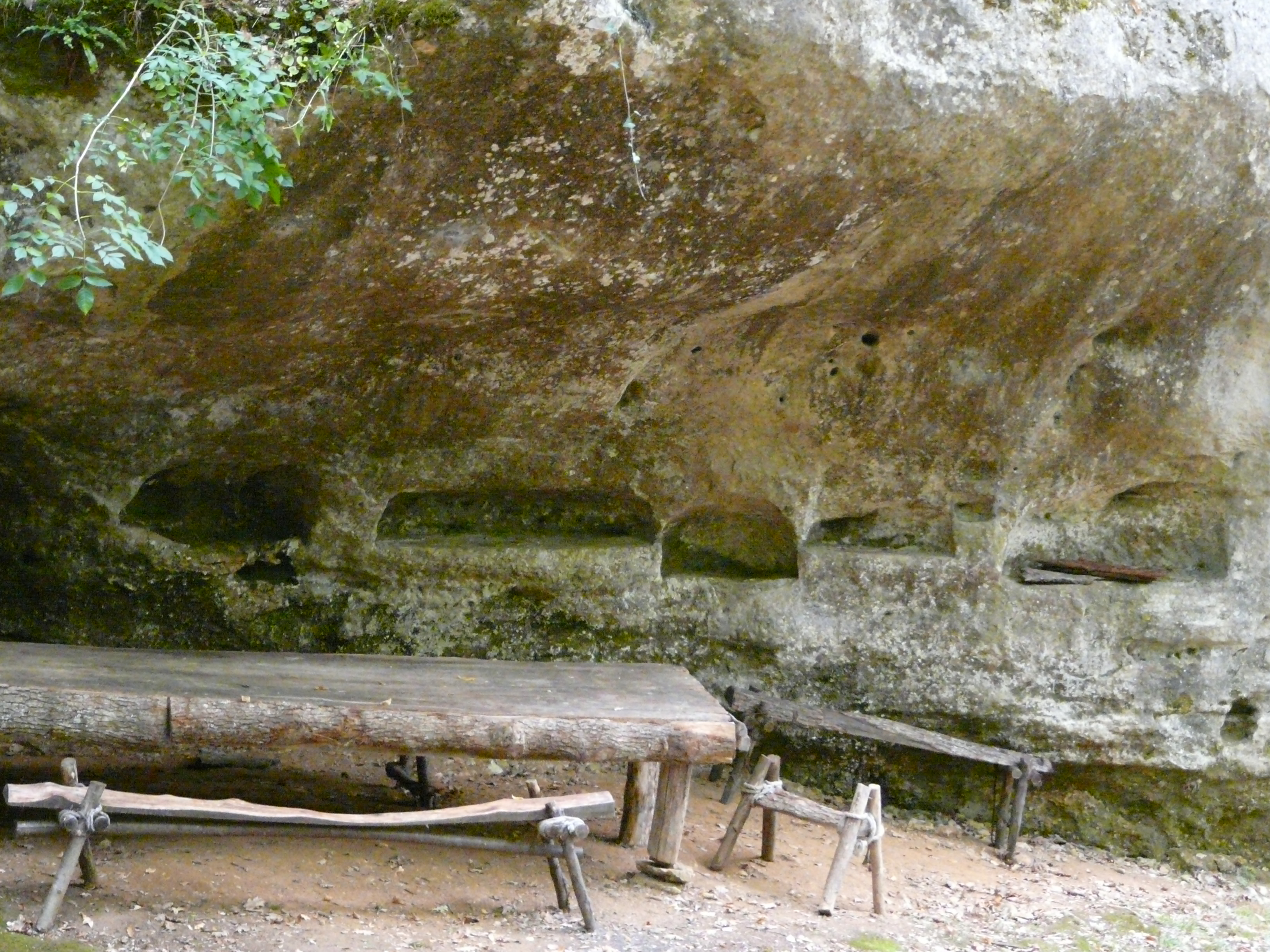 L'abri de la Souquette, Castel Merle, Sergeac, Dordogne, France.